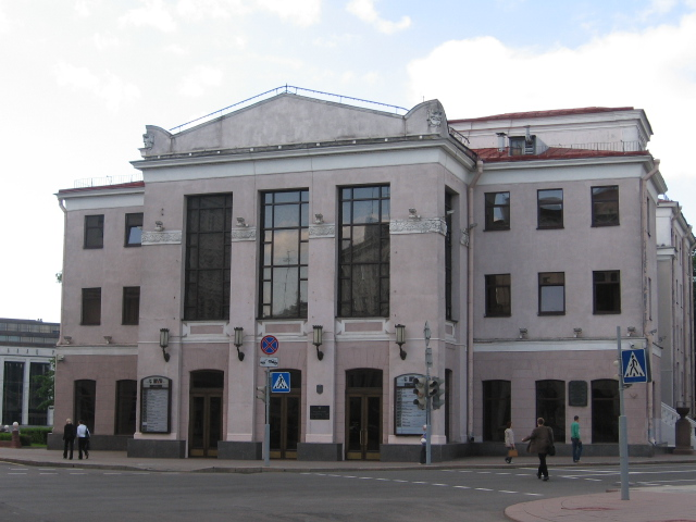 Театр Янки Купалы, Минск